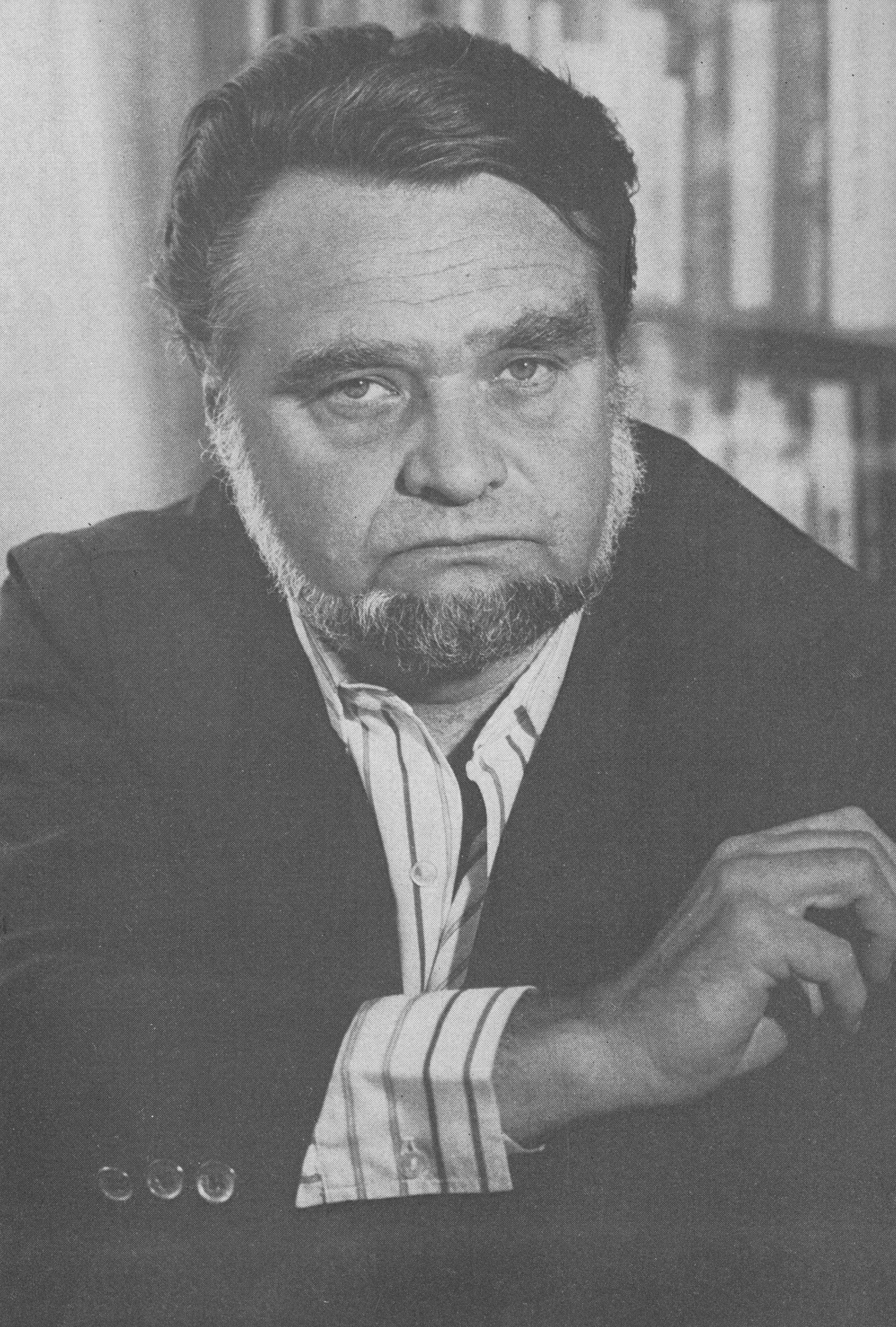 Gyurkovics Tibor fényképe a Szép Versek című antológiában Kötet címe: Szép versek 1978 Kötet megjelenési éve: 1979 A kép köteten belüli sorszáma: 19